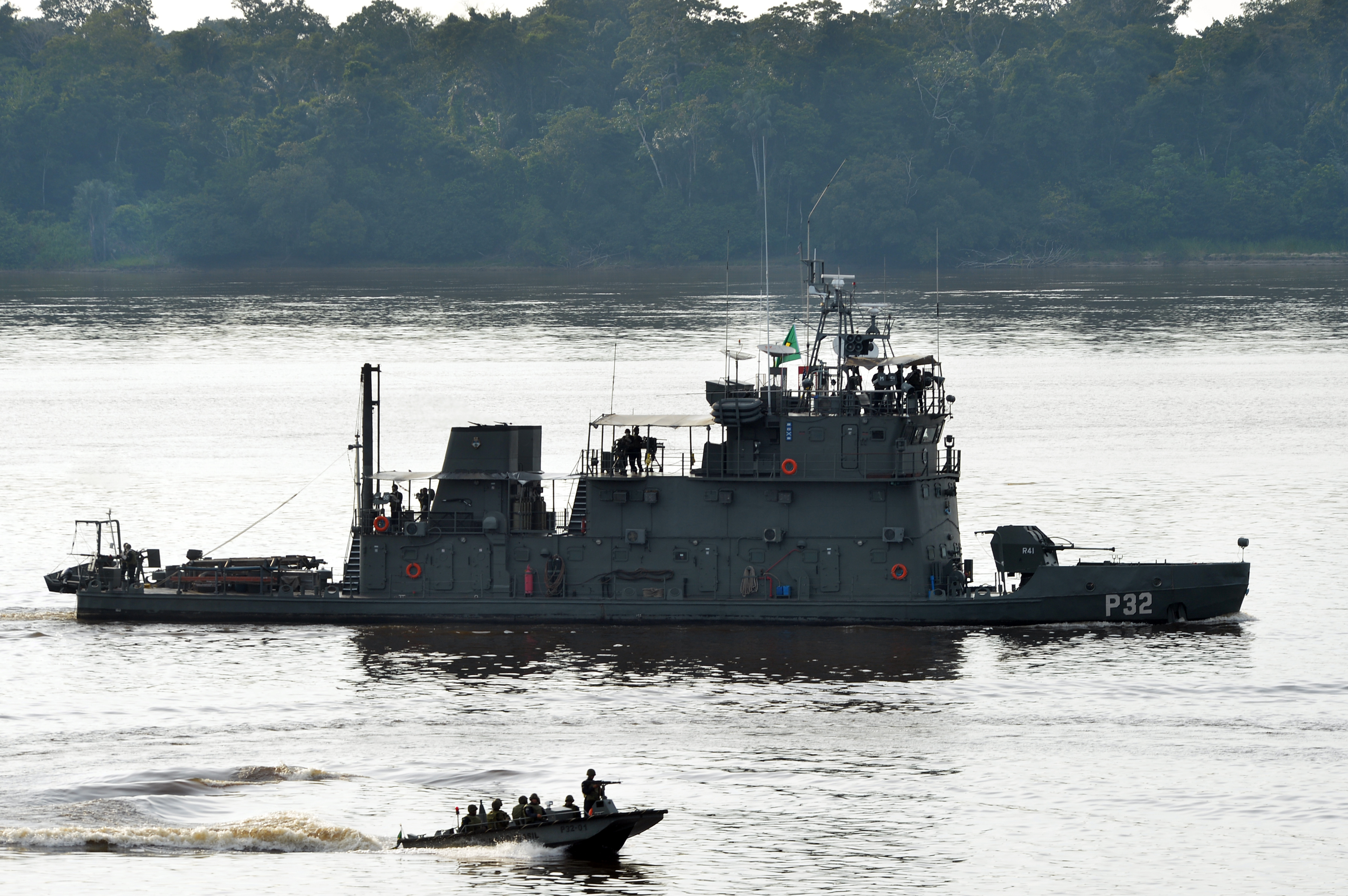 Ministro da Defesa visita Vila Bitencourt - AM